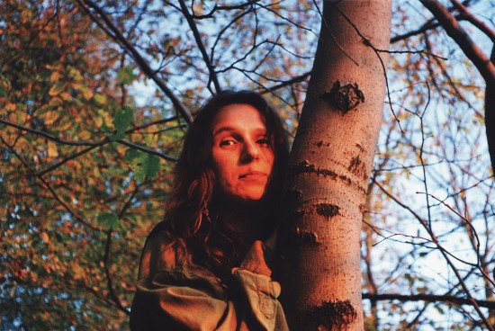 Agnieszka Haupe-Kalka in den Bieszczaden; Foto: Dieter Kalka